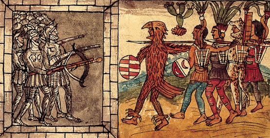 Combat entre indiens et espagnols